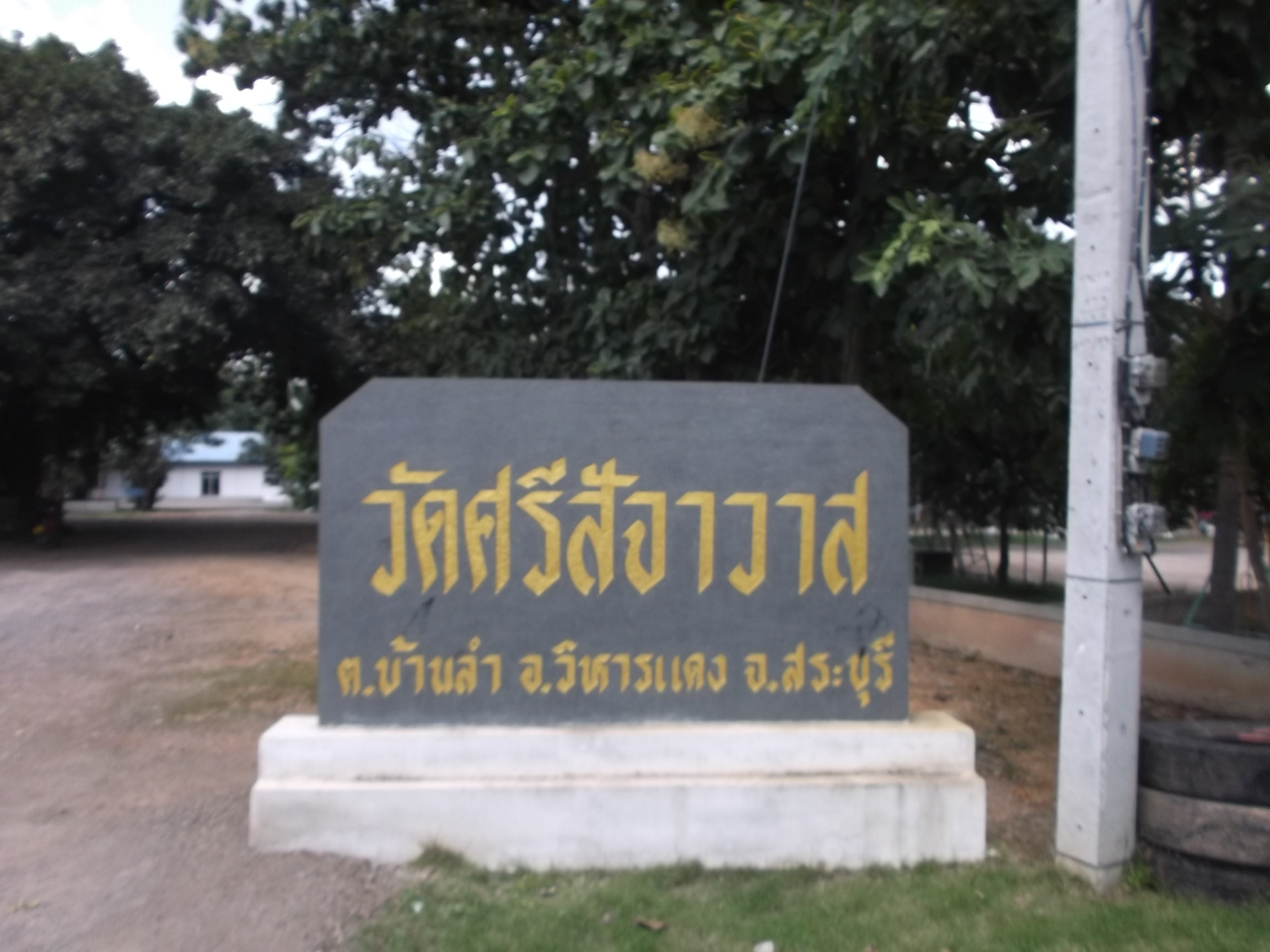 ป้ายวัดศรีสัจจาวาส ซึ่งตั้งอยู่บริเวณหน้าวัด